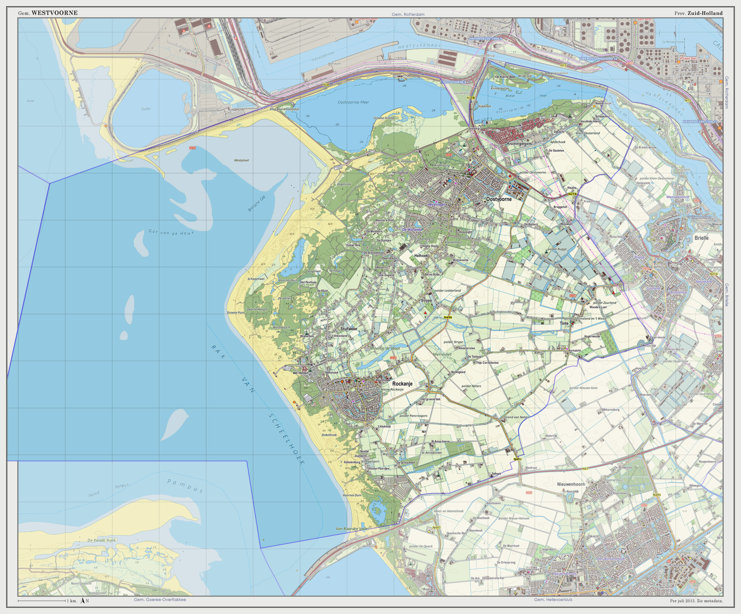 Topografische kaart van gemeente Westvoorne (2013). Samengesteld door Jan-Willem van Aalst op basis van de GML open geodata van de BRT/Top10NL (basisregistratie Topografie, Kadaster 2011), vrijgegeven door Kadaster onder de Creative Commons BY licentie. Additionele gegevens uit BAG (8 juli 2013), uit de Open Street Map (9 juli 2013) en uit de Risicokaart. Peildatum kaartbeeld: 9 juli 2013. Zie ook Gemeentenatlas.nl Samenstelling en kleurenschema: Jan-Willem van Aalst, met QuantumGIS en Photoshop. Zie ook de Legenda.